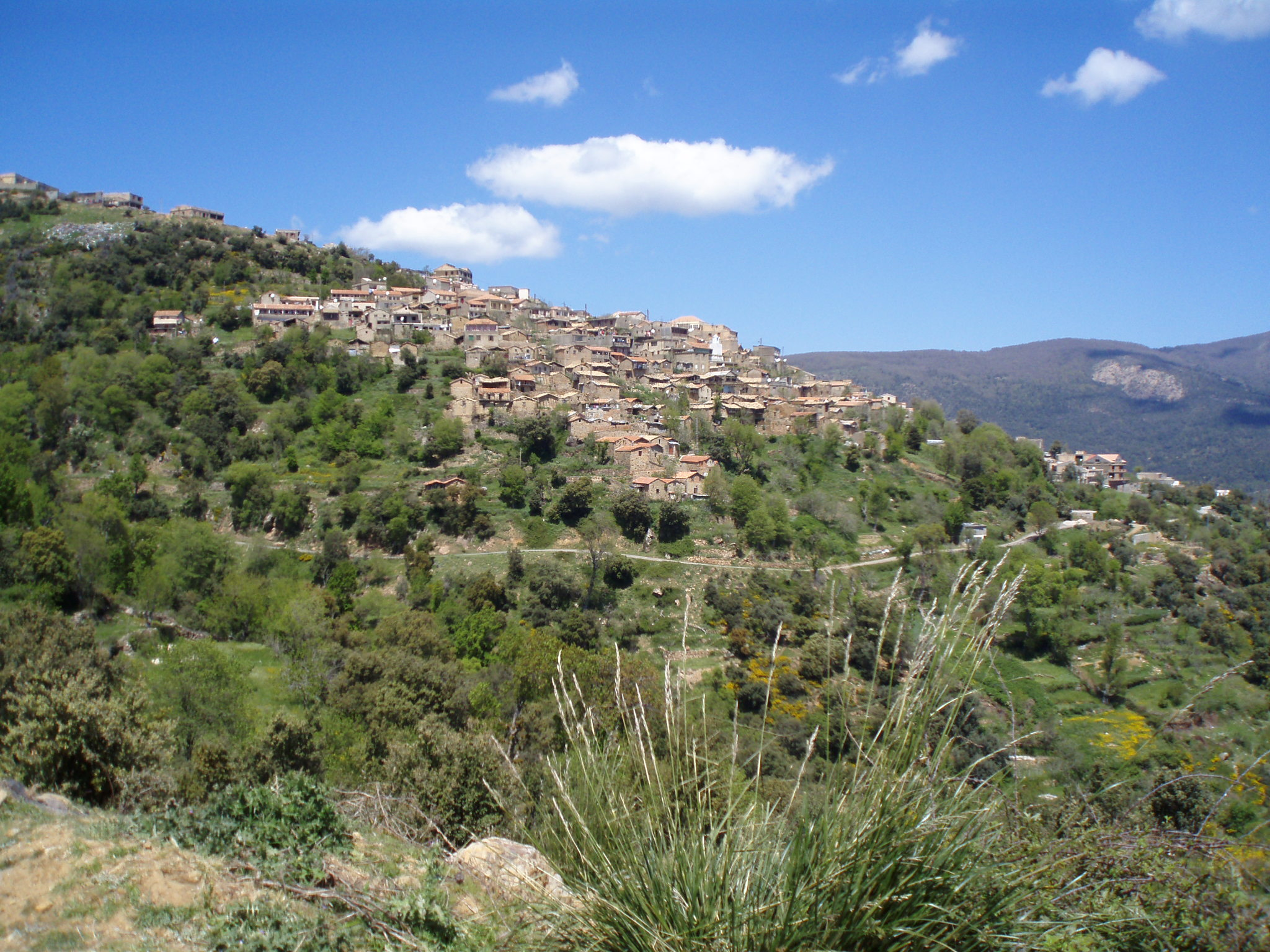 photo village Imaghdacene